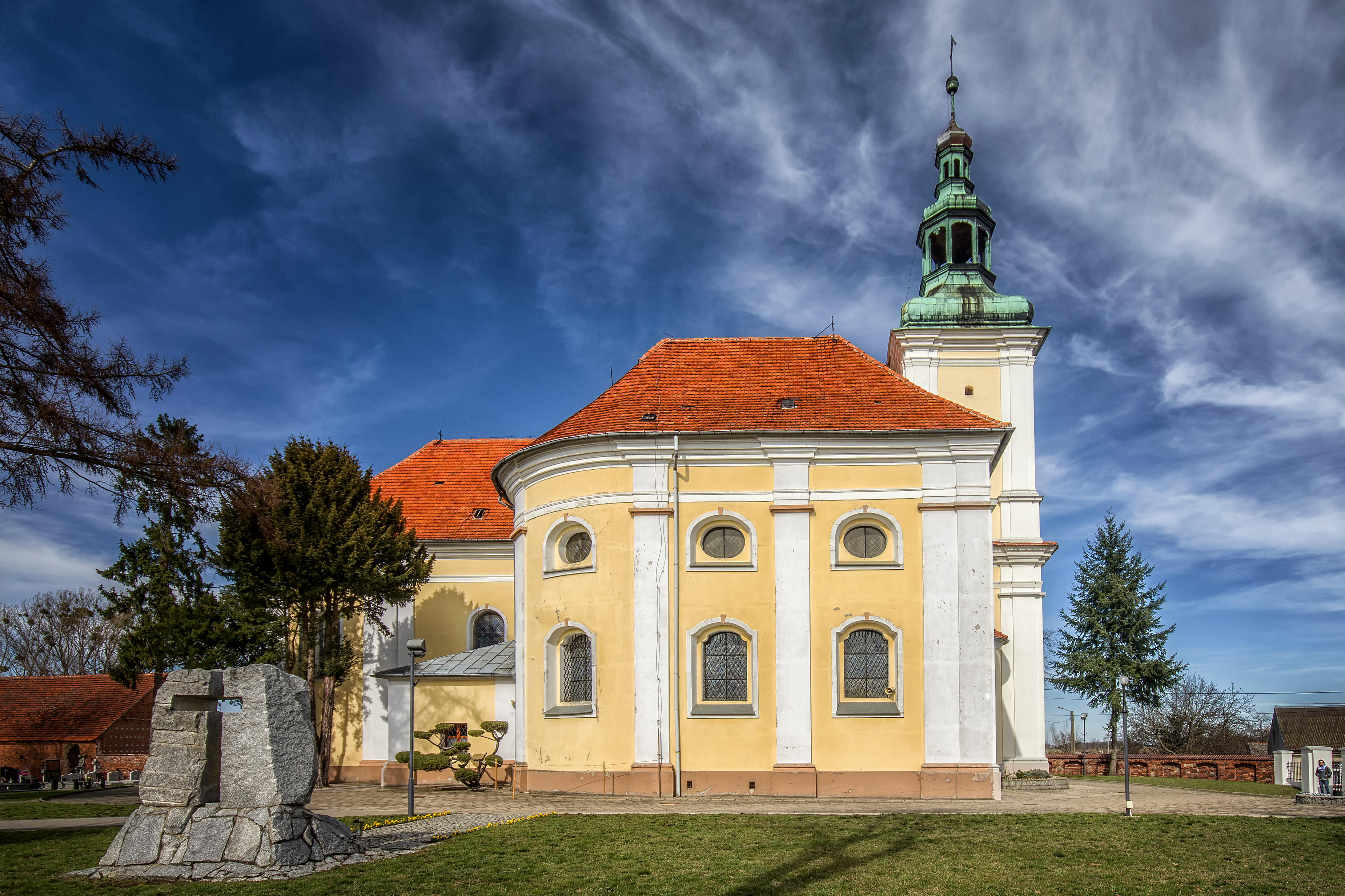 Zduny, kościół par. św. Jana Chrzciciela, 1719-1733